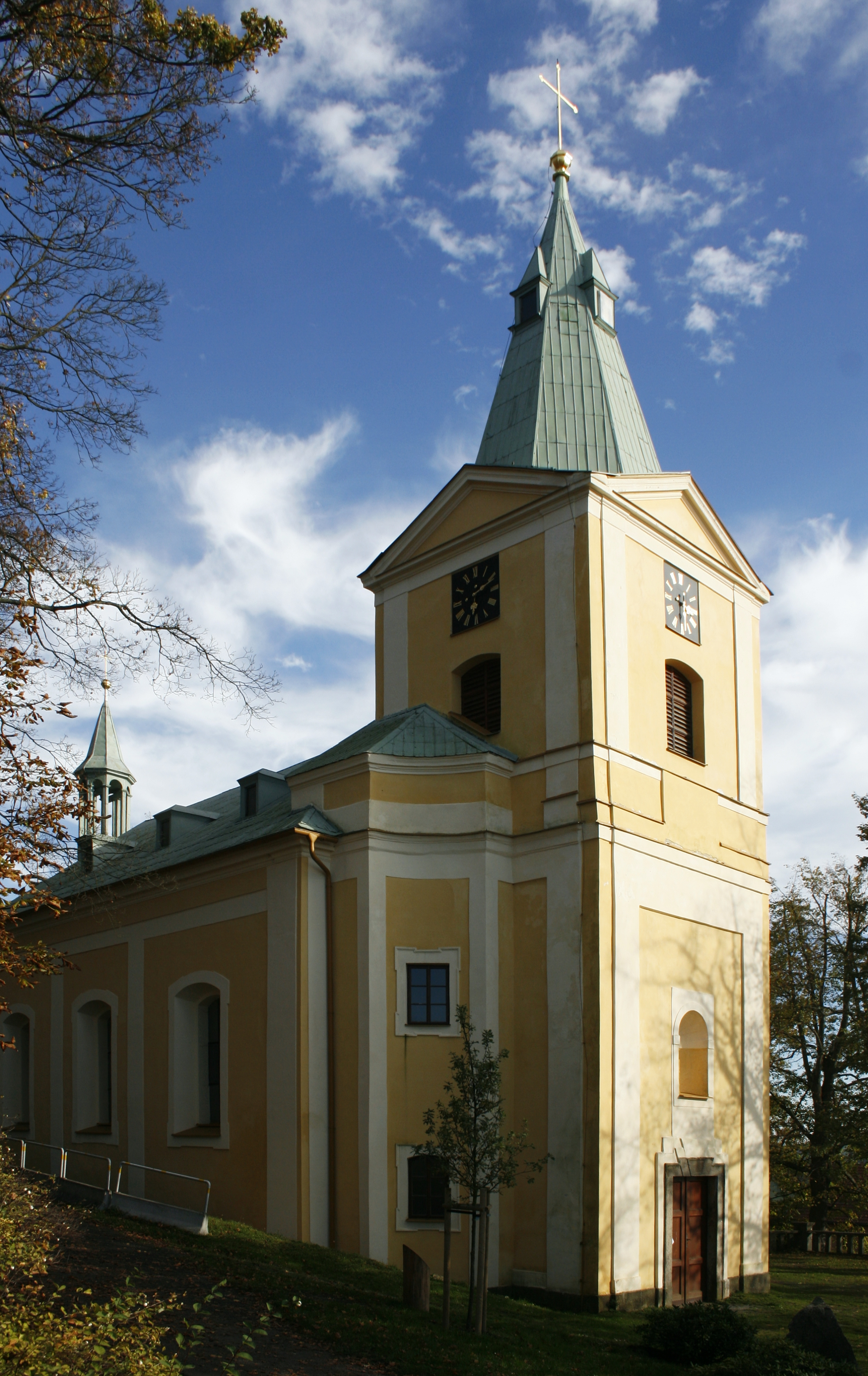 Andělská Hora - kostel svatého Michaela Archanděla